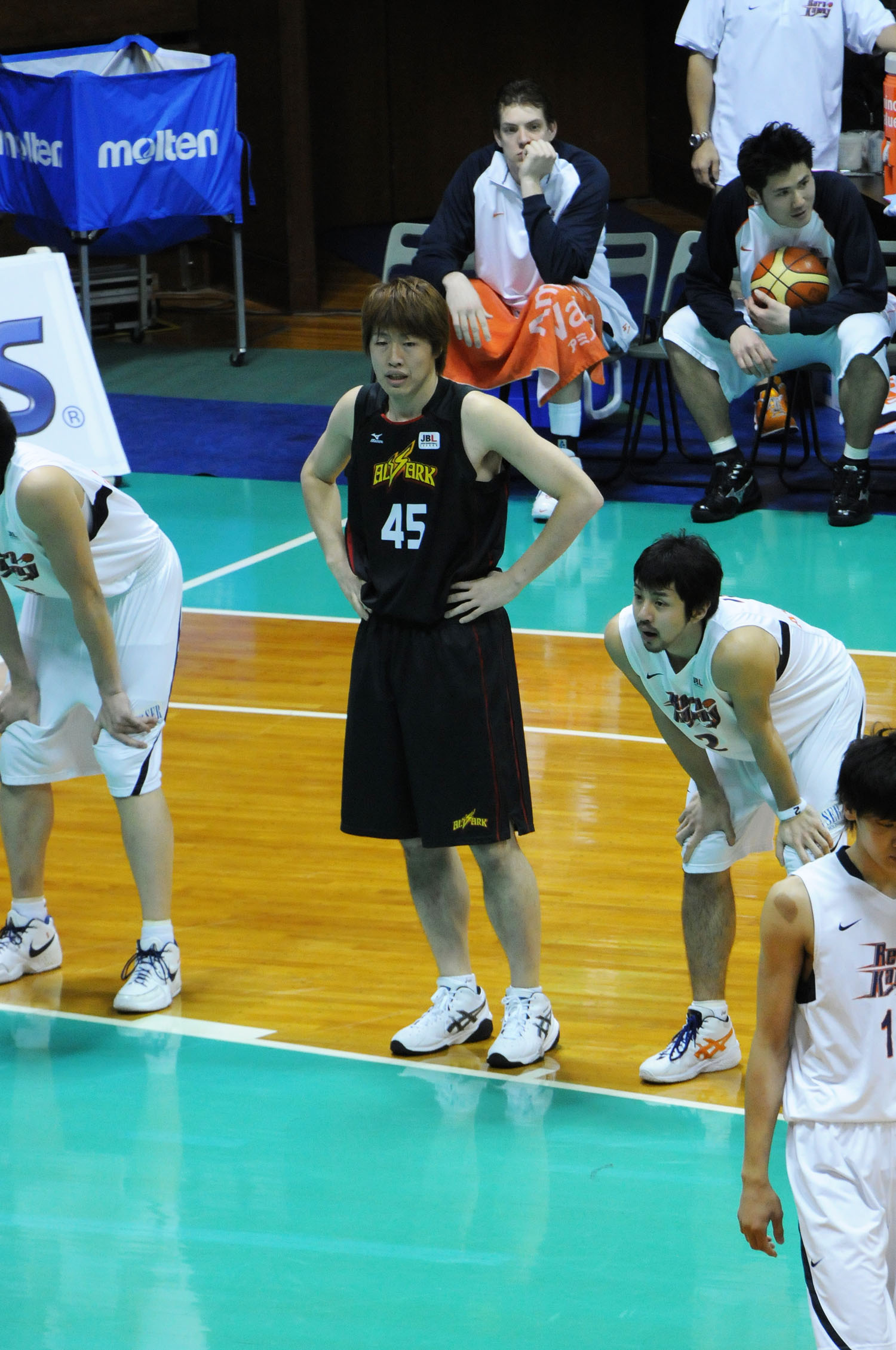 トヨタ自動車アルバルク、古田悟選手。代々木第二体育館で。